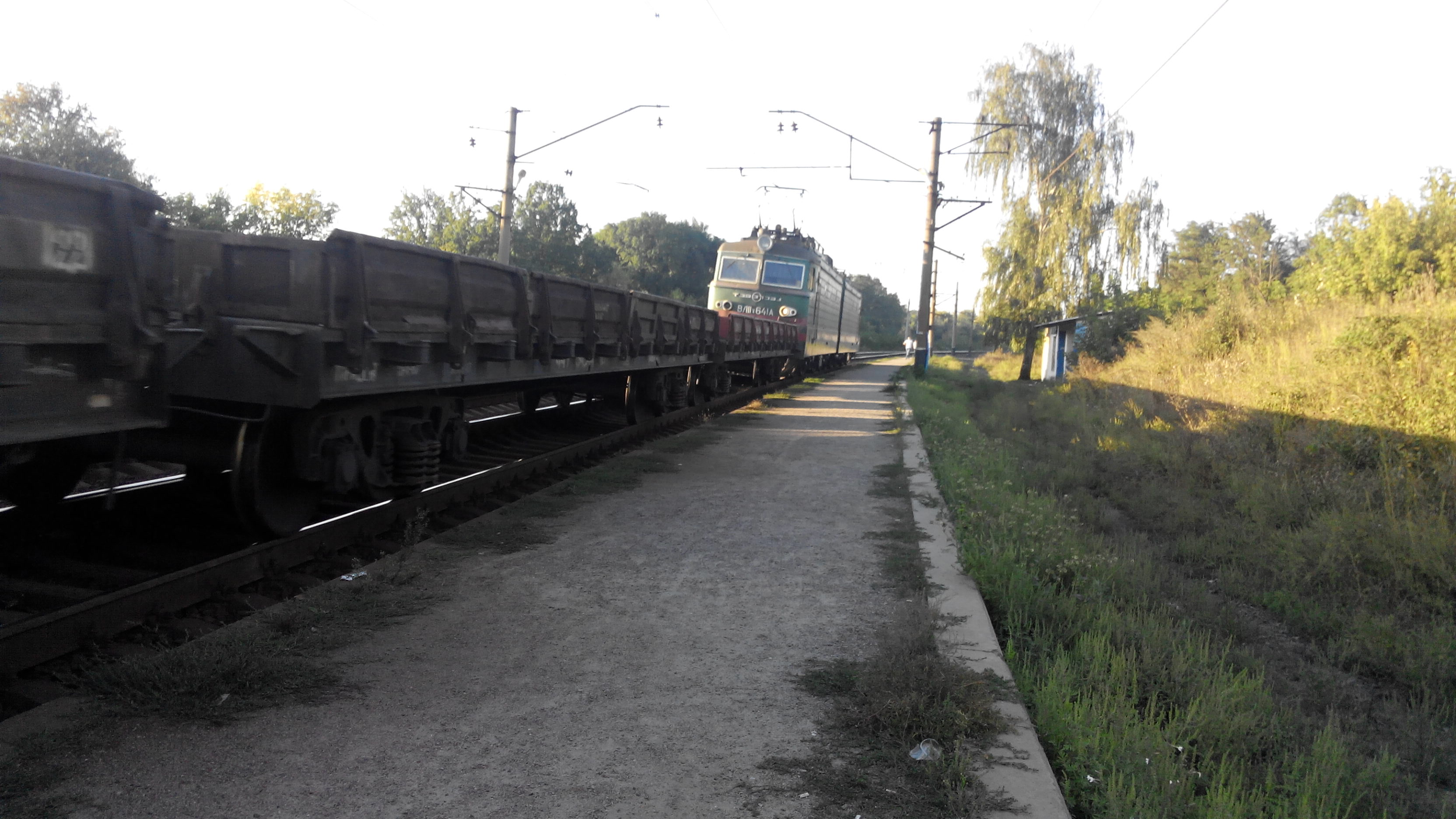 Україна. Харківська область. Зміївський район. Село Звідки. Залізнична станція «Звідки».